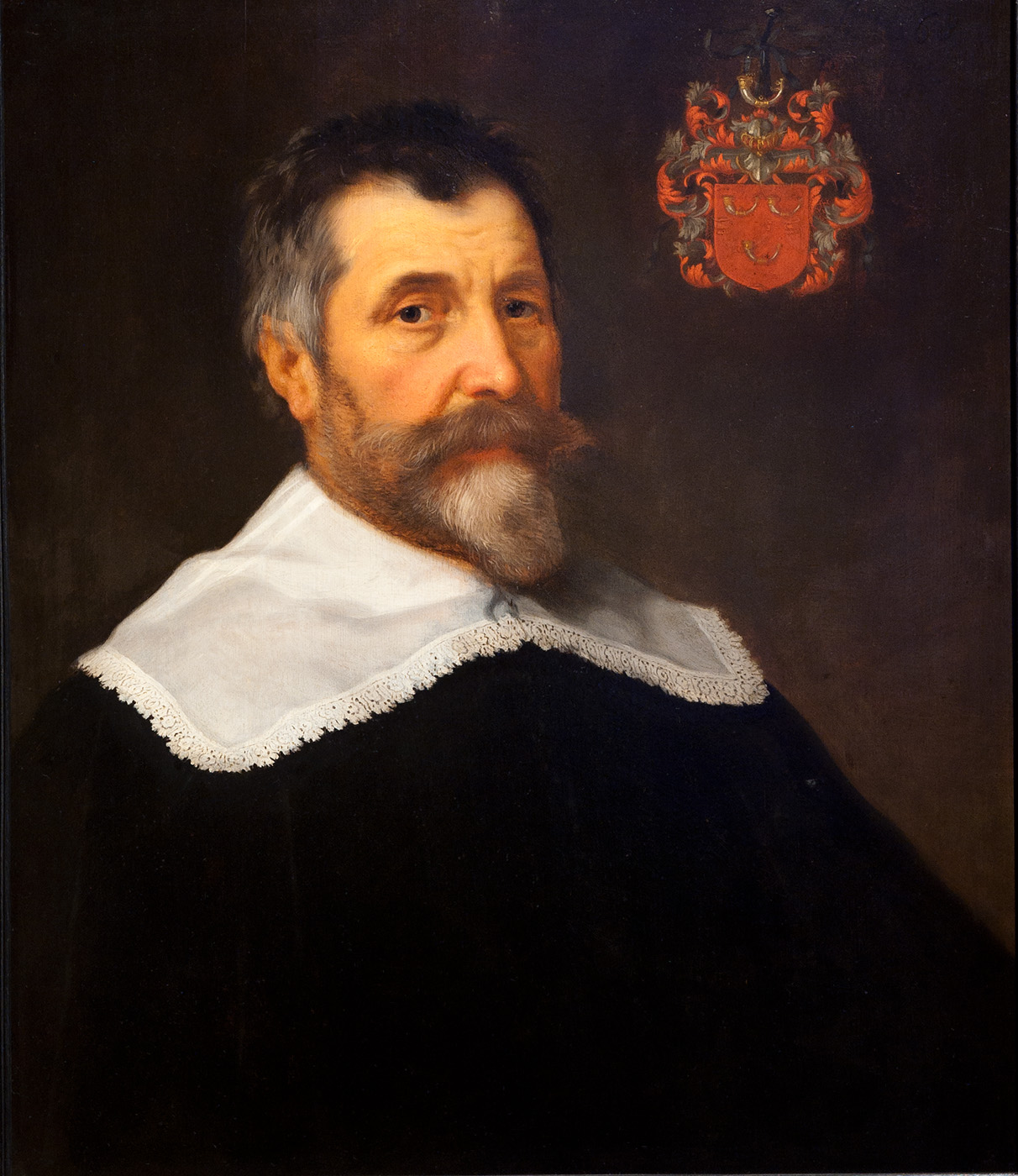 Dirck de Vlaming van Oudtshoorn (1574-1643), holländischer Aristokrat und Amsterdamer Regent des Goldenen Zeitalters